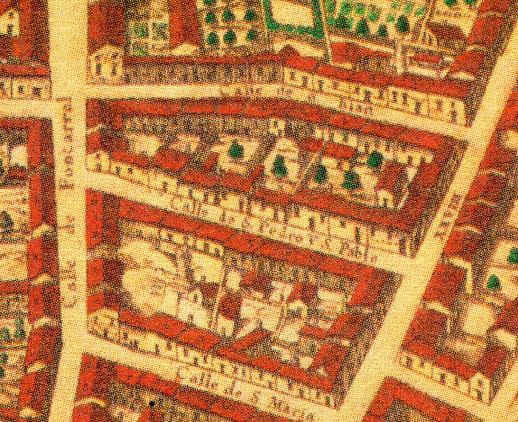 Topografía de la Villa de Madrid descrita por Don Pedro Texeira en 1656, en la cual se demuestran todas las calles al largo y ancho de cada una de ellas, las rinconadas y lo que tuercen las Plazas, fuentes, jardines y huertas con la disposición que tienen las parroquias, Monasterios y Hospitales están señalados sus nombres con letras y números que se hallaran en la tabla y los demás edificios, torres y delanteras de las casas de la parte que mira al Mediodía están sacadas al natural que se podrán tocar las puertas y ventanas de cada una de ellas.